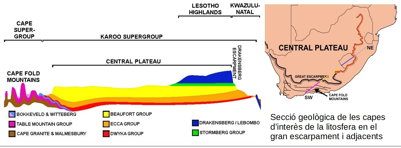 Secció SW - NE que explica les diferents capes de roca segons el seu tipus, abarcant diferents sistemes geològics segons la seva evolució.